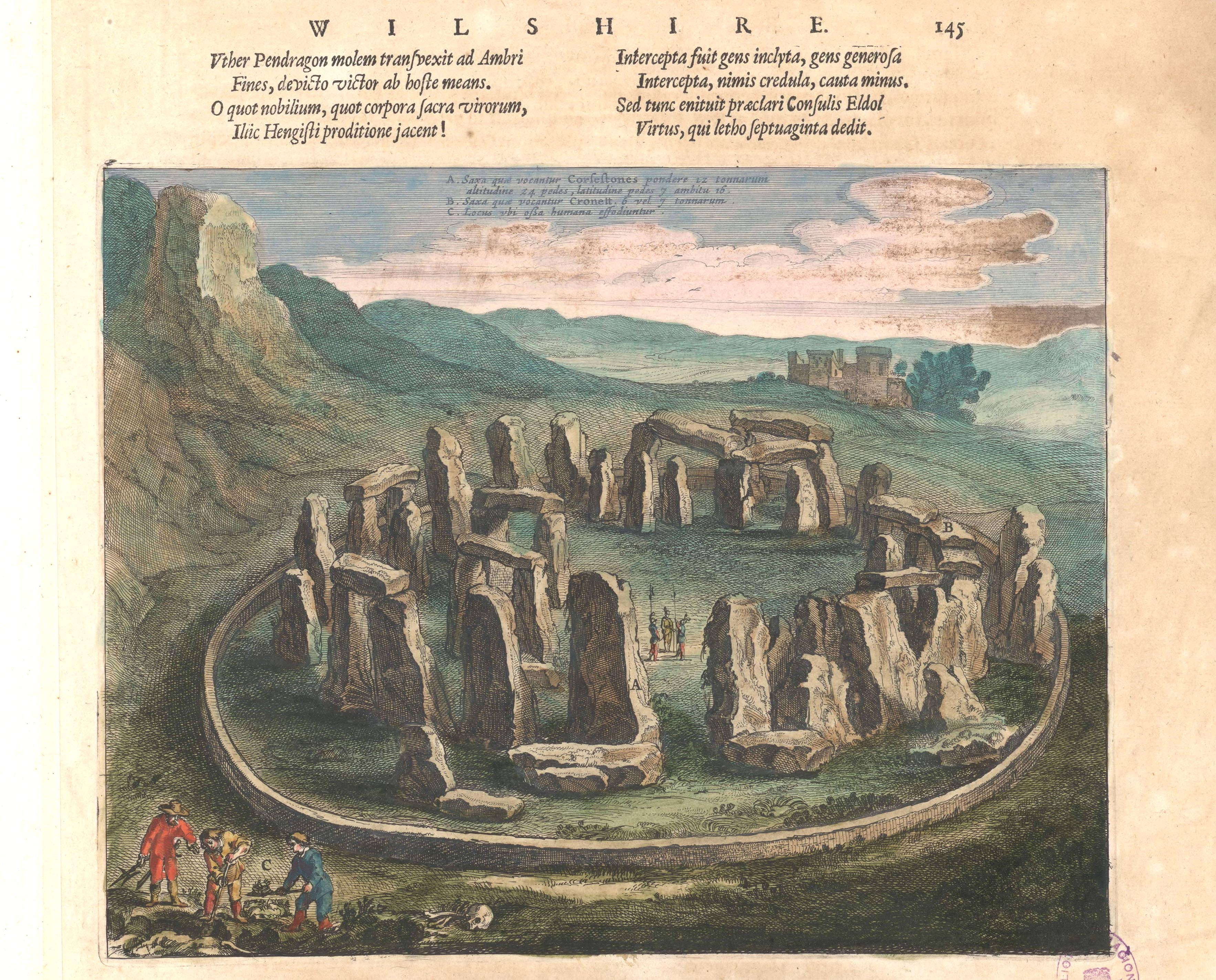 Plaatje van Stonehenge (GMG 432 88)